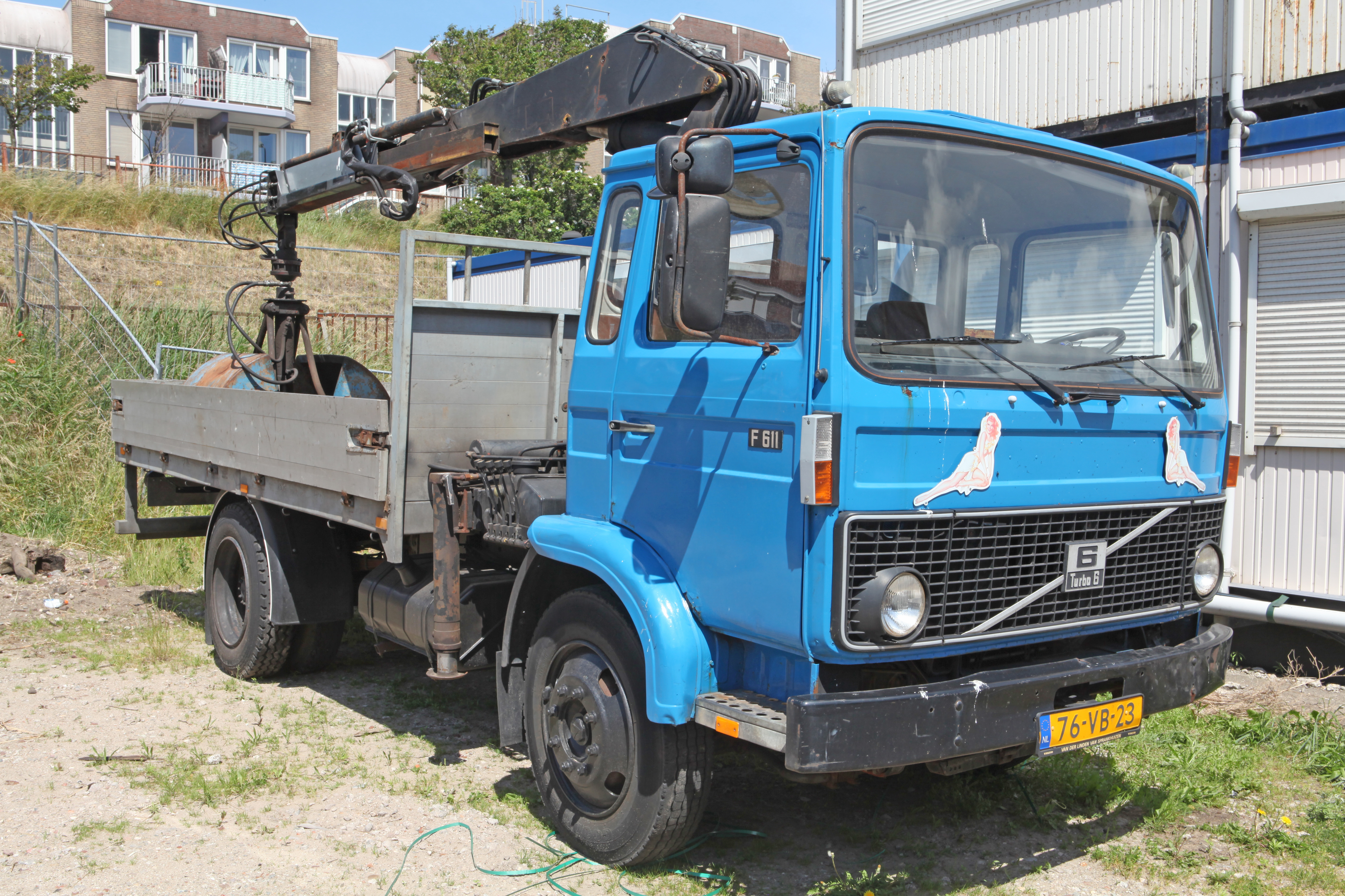 1980 Volvo F 611